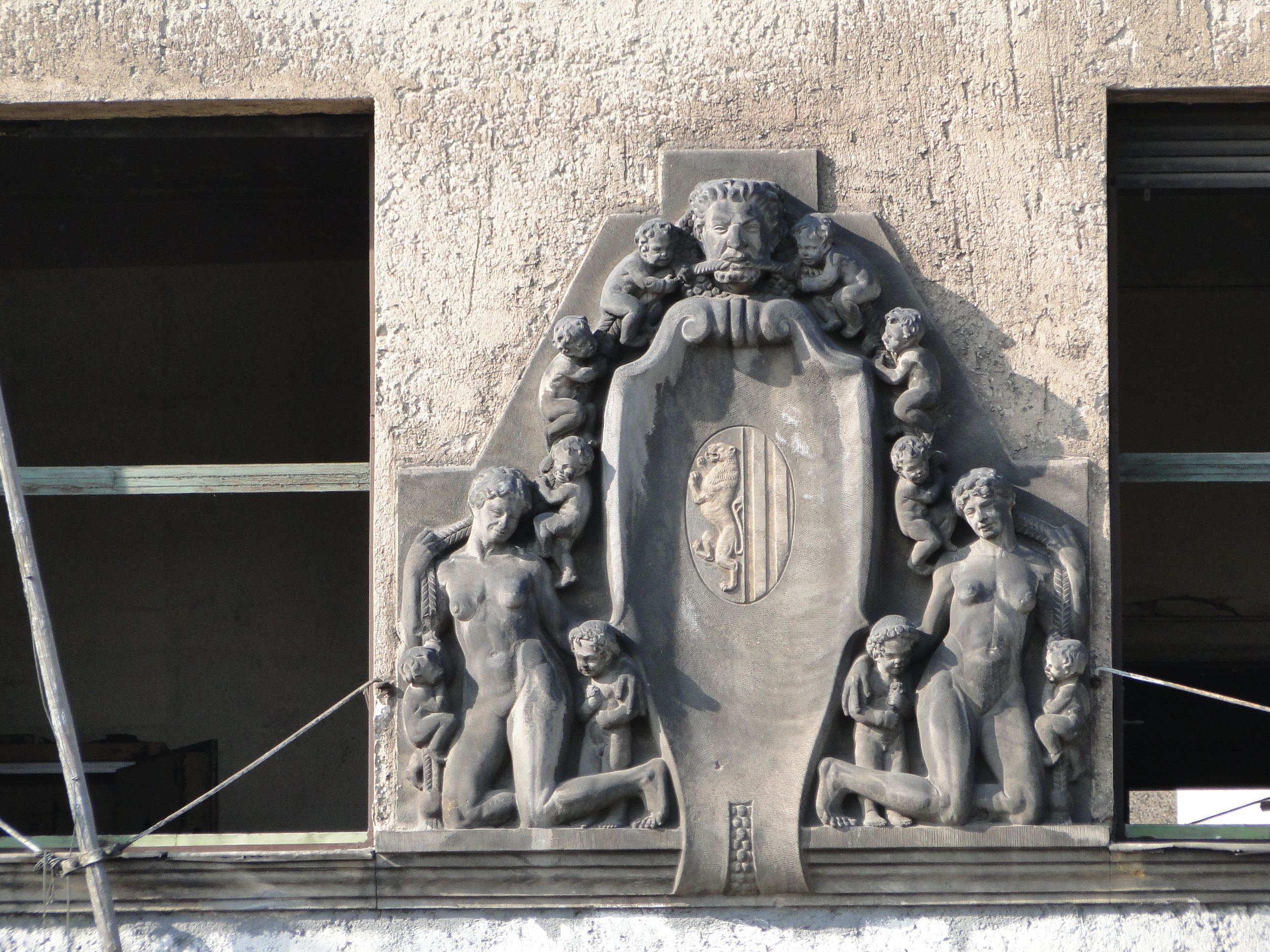 Stadthaus Friedrichstadt, Fassadendetail